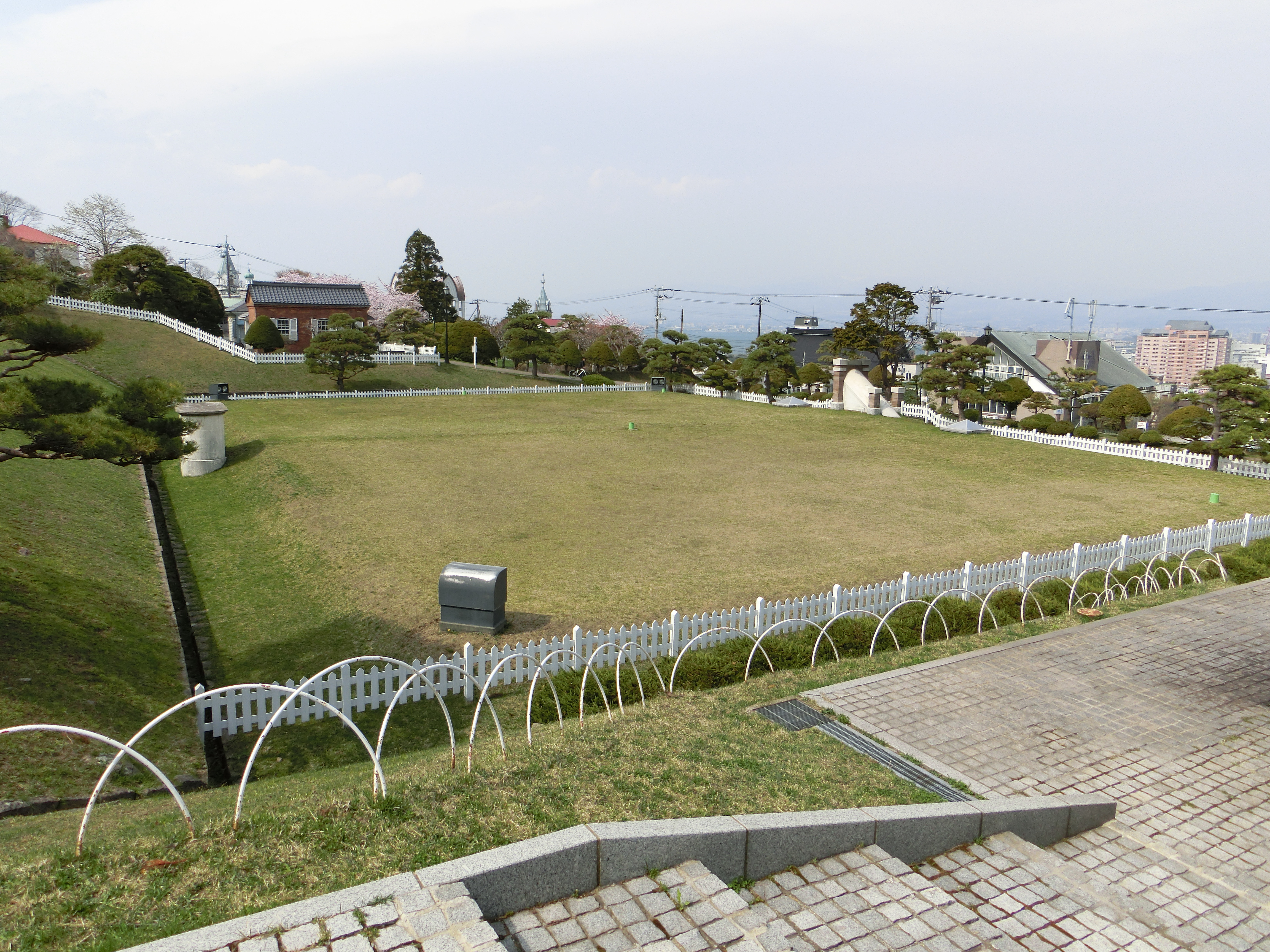 北海道函館市元町にある配水池。